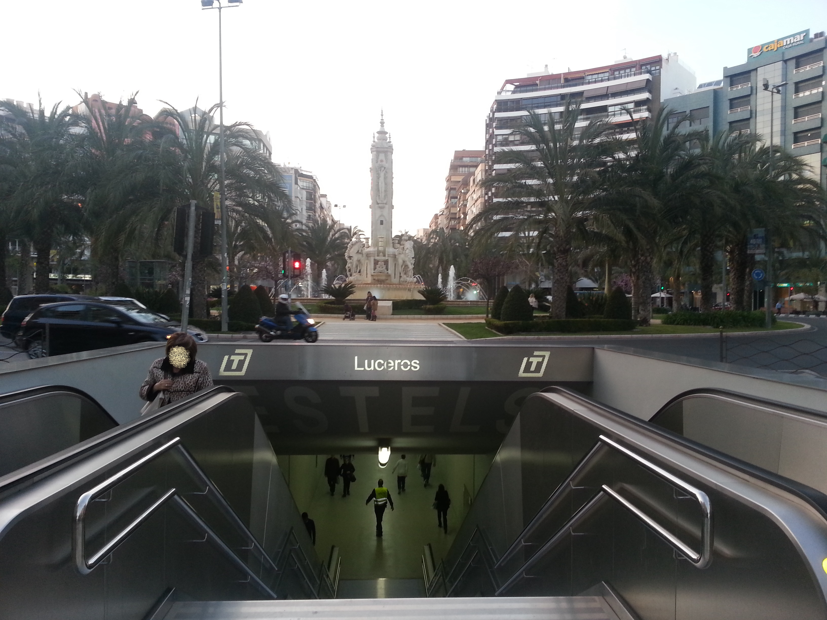 Uno de los accesos a la Estación de Luceros del TRAM de Alicante